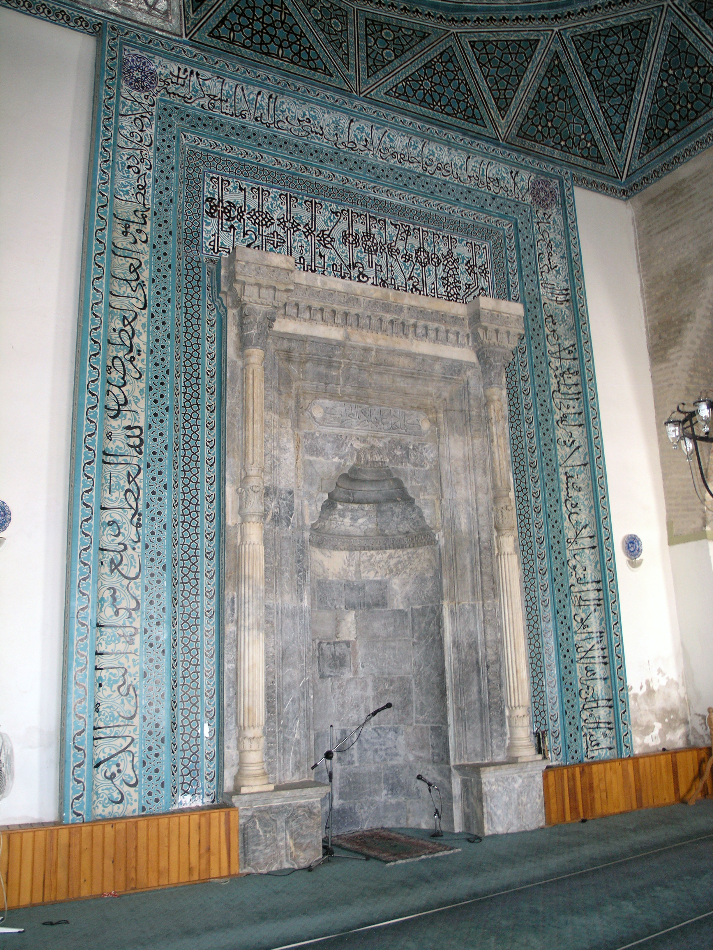 Турция, Конья – Мечеть Ала ад-Дина